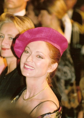 Marie-France Pisier au festival de Cannes